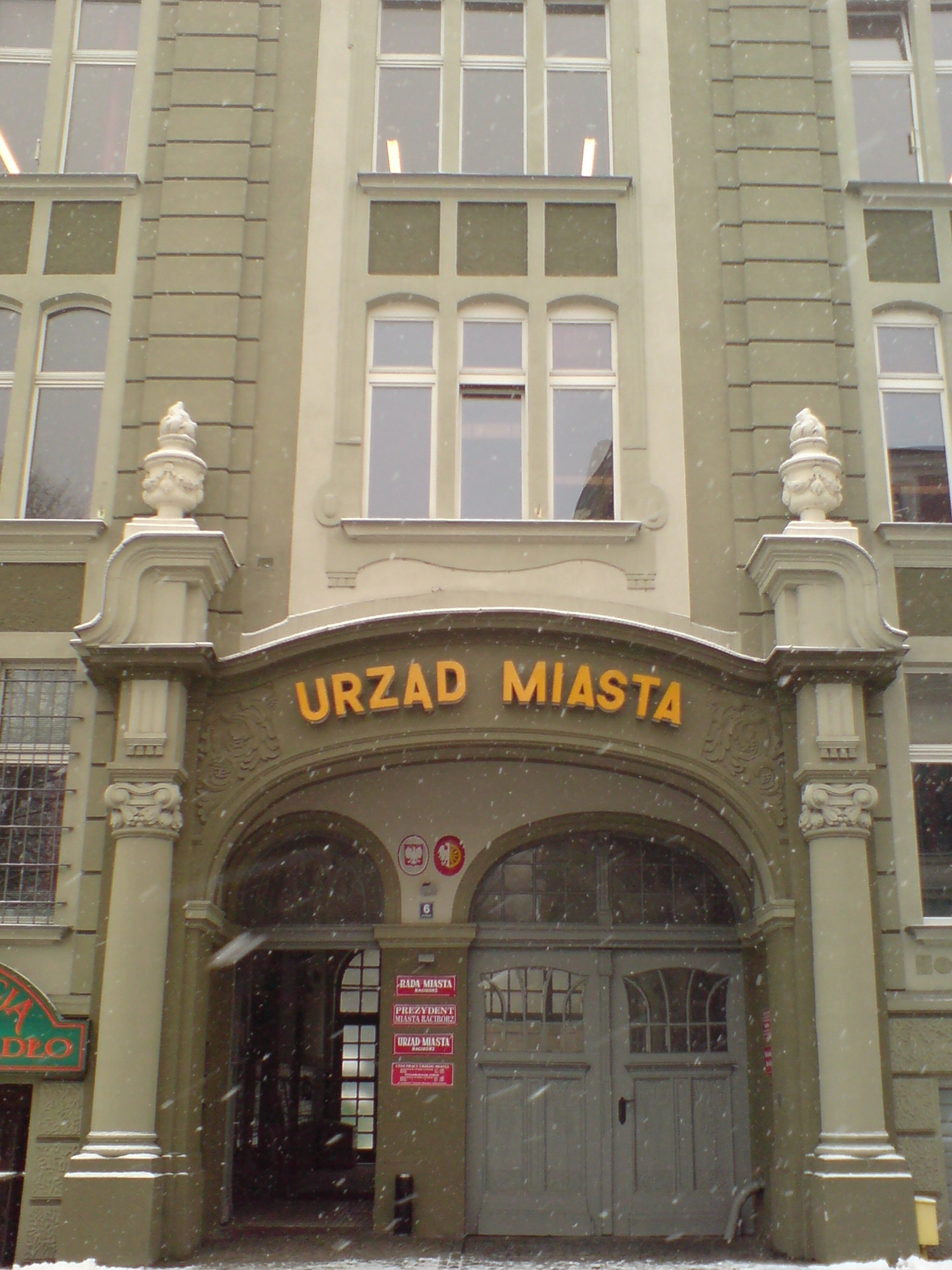 Racibórz, ul. Króla Stefana Batorego 6 - portal wejścia do Urzędu Miasta